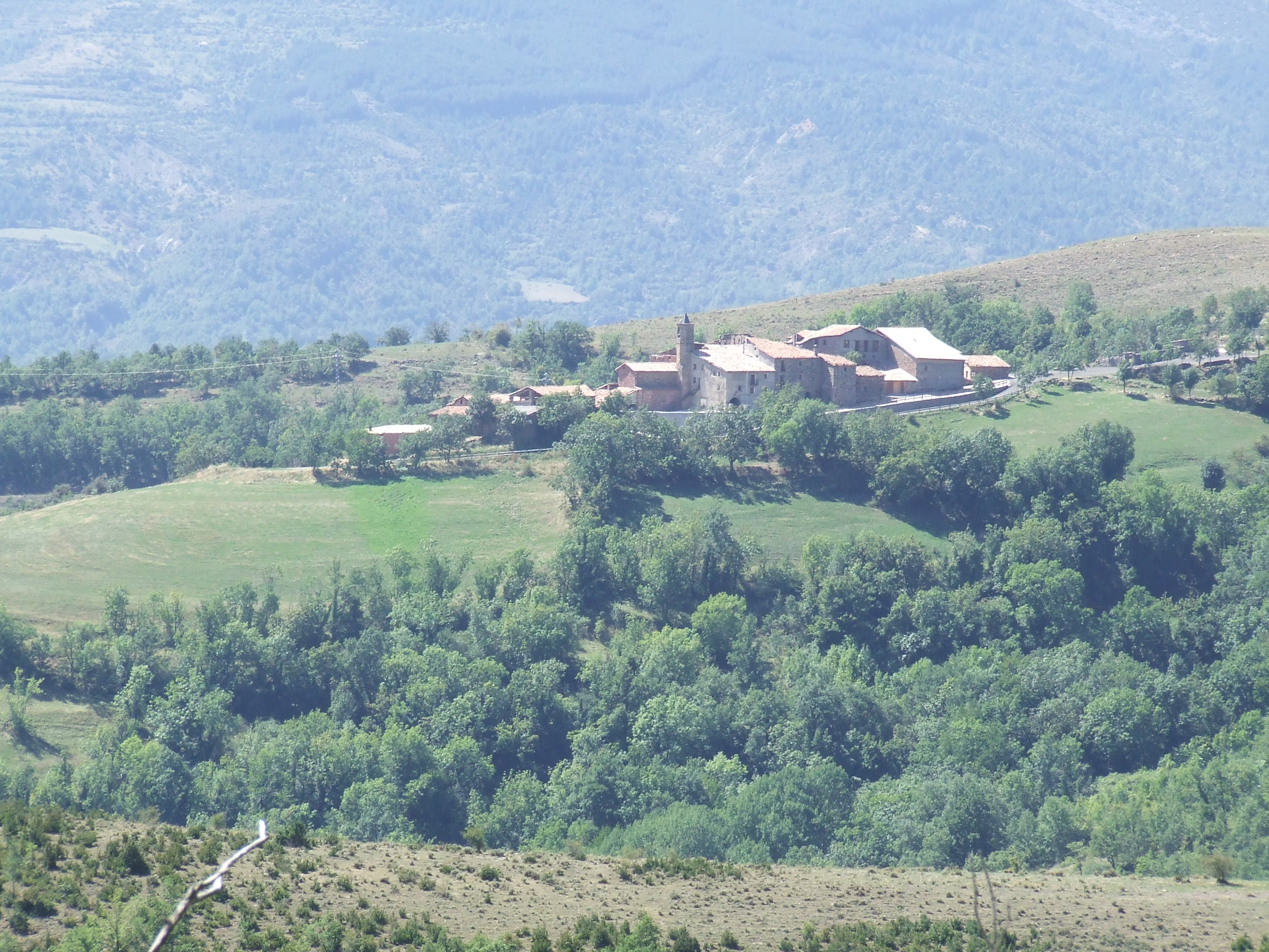 Estavill des d'Antist (la Pobleta de Bellveí, la Torre de Cabdella, Pallars Jussà